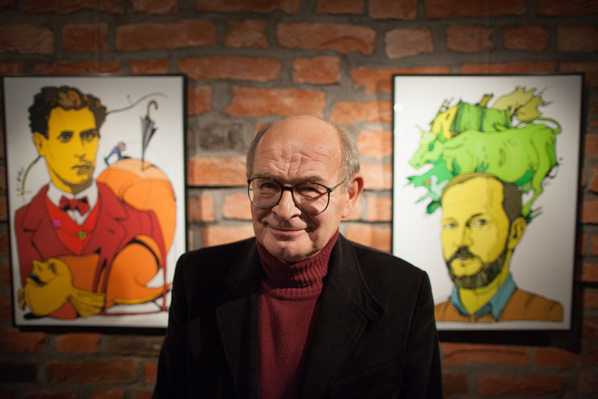 Bolesław Polnar fot. Sławomir Mielnik